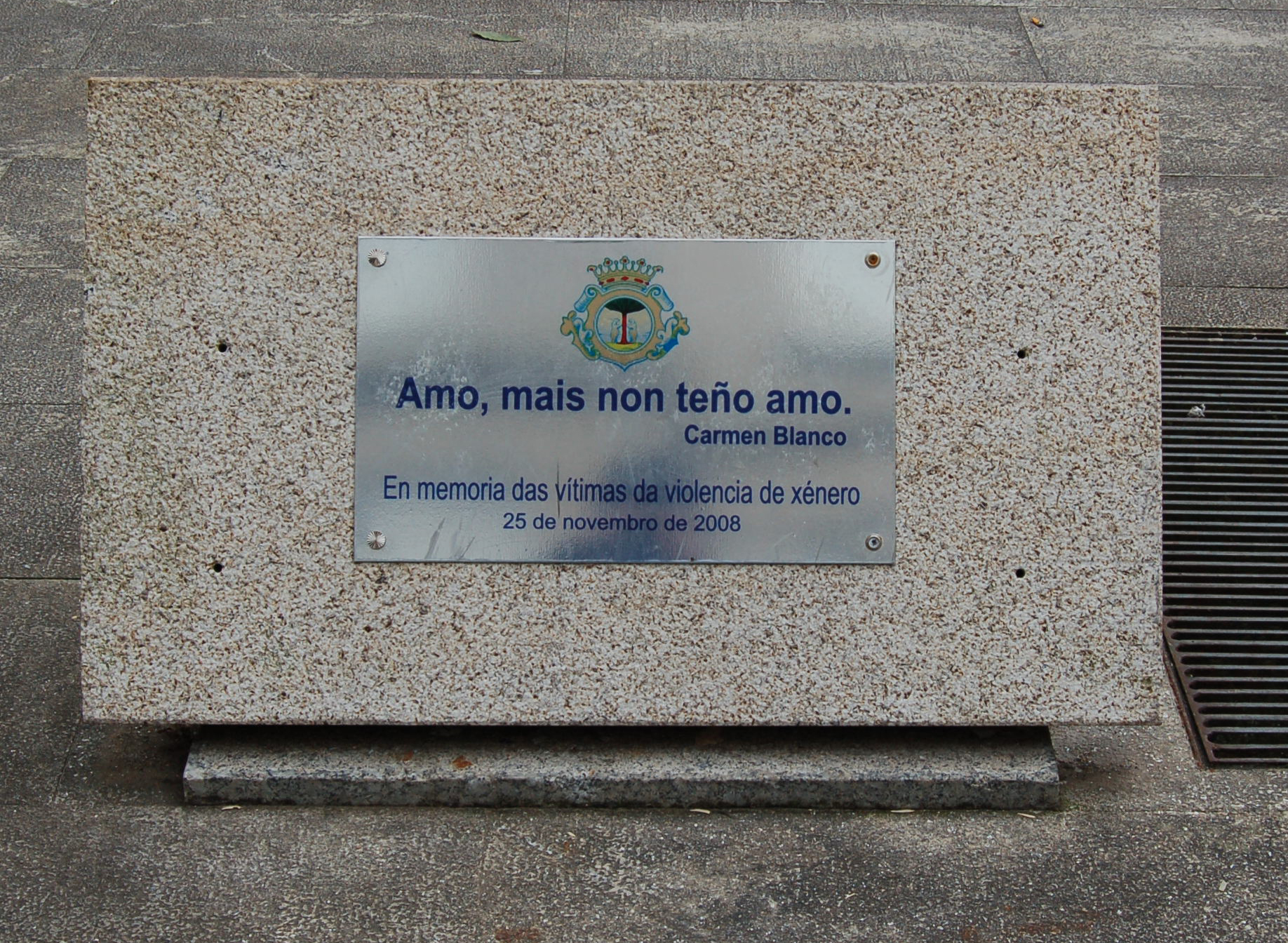 Placa co texto "Amo, mais non teño amo", da poeta Carmen Blanco García. A placa foi instalada nun monólito o 25 de novembro de 2008 en memoria das vítimas da violencia de xénero, na praza de Emilia Pardo Bazán do Carballiño.